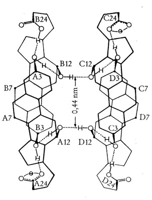 DCA Tetramer